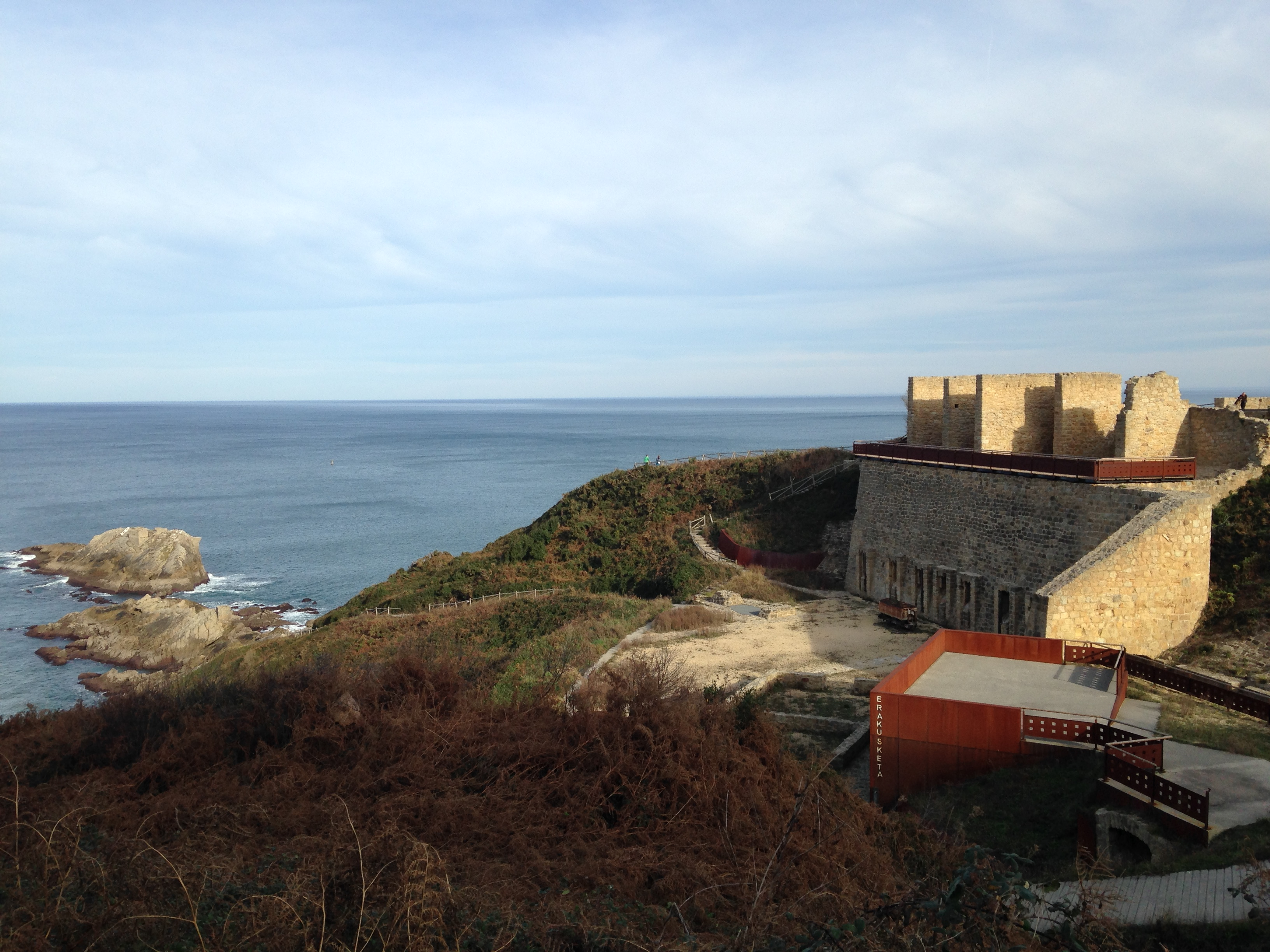 Zarauzko Mollarri (edo Malla Harria) uhartea eta bertako mea biltegiaren aztarnak